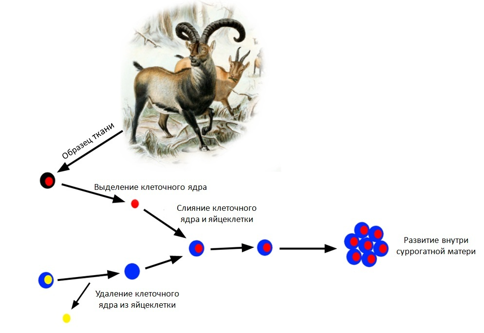 Схематичное изображение процесса клонирования клеток пиренейского козерога. Была взята культура тканей из последней самки пиренейского козерога по имени Селия. Из этой культуры тканей выделено клеточное ядро. Затем это ядро введено в яйцеклетку домашней козы, из которой предварительно удалено её собственное клеточное ядро с наследственной информацией. После этого яйцеклетка козы с ДНК пиренейского козерога имплантирована в суррогатную мать — другую козу. Примечания:( (